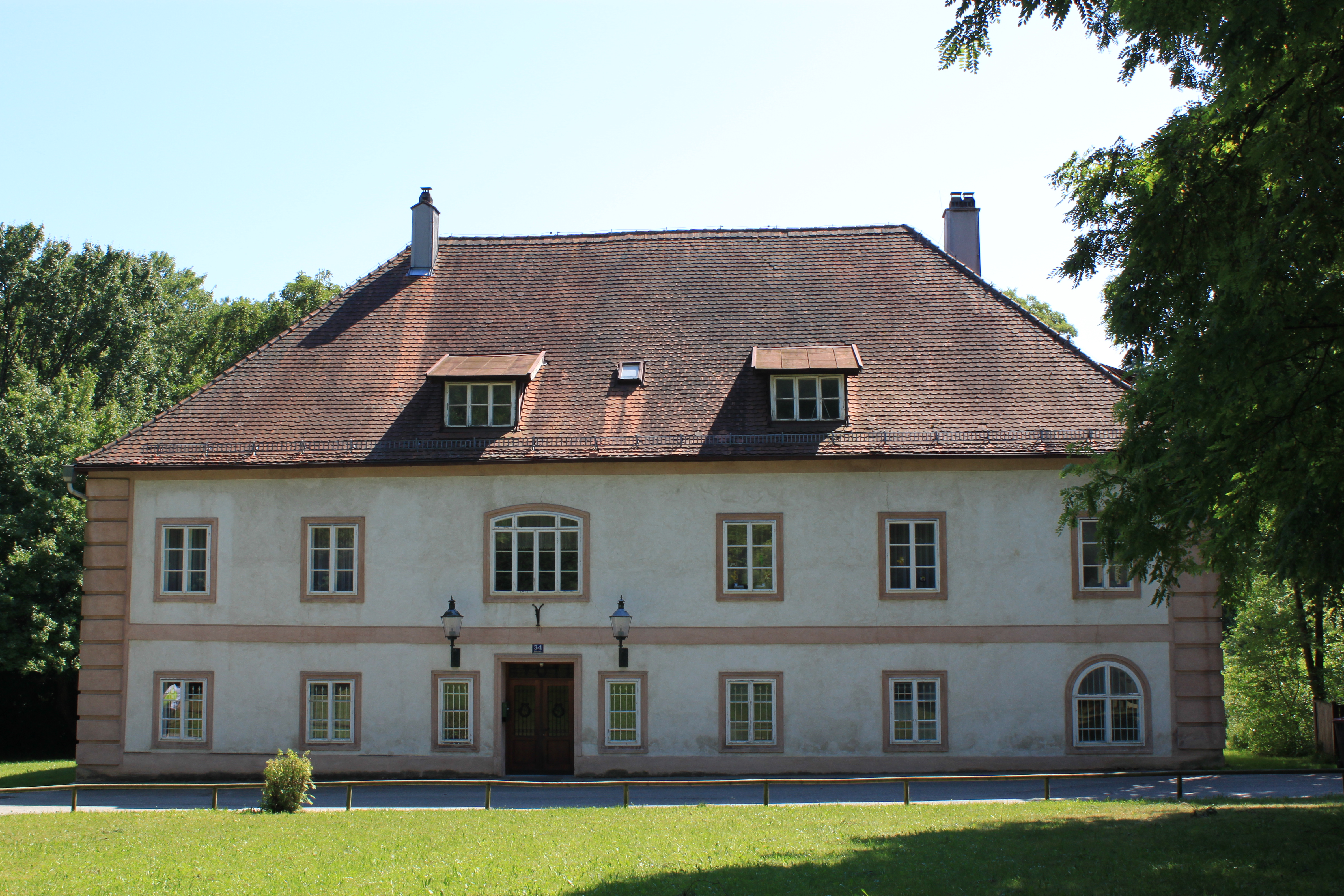 Schloss Edla, Edlastraße 32-34, 3300 Amstetten